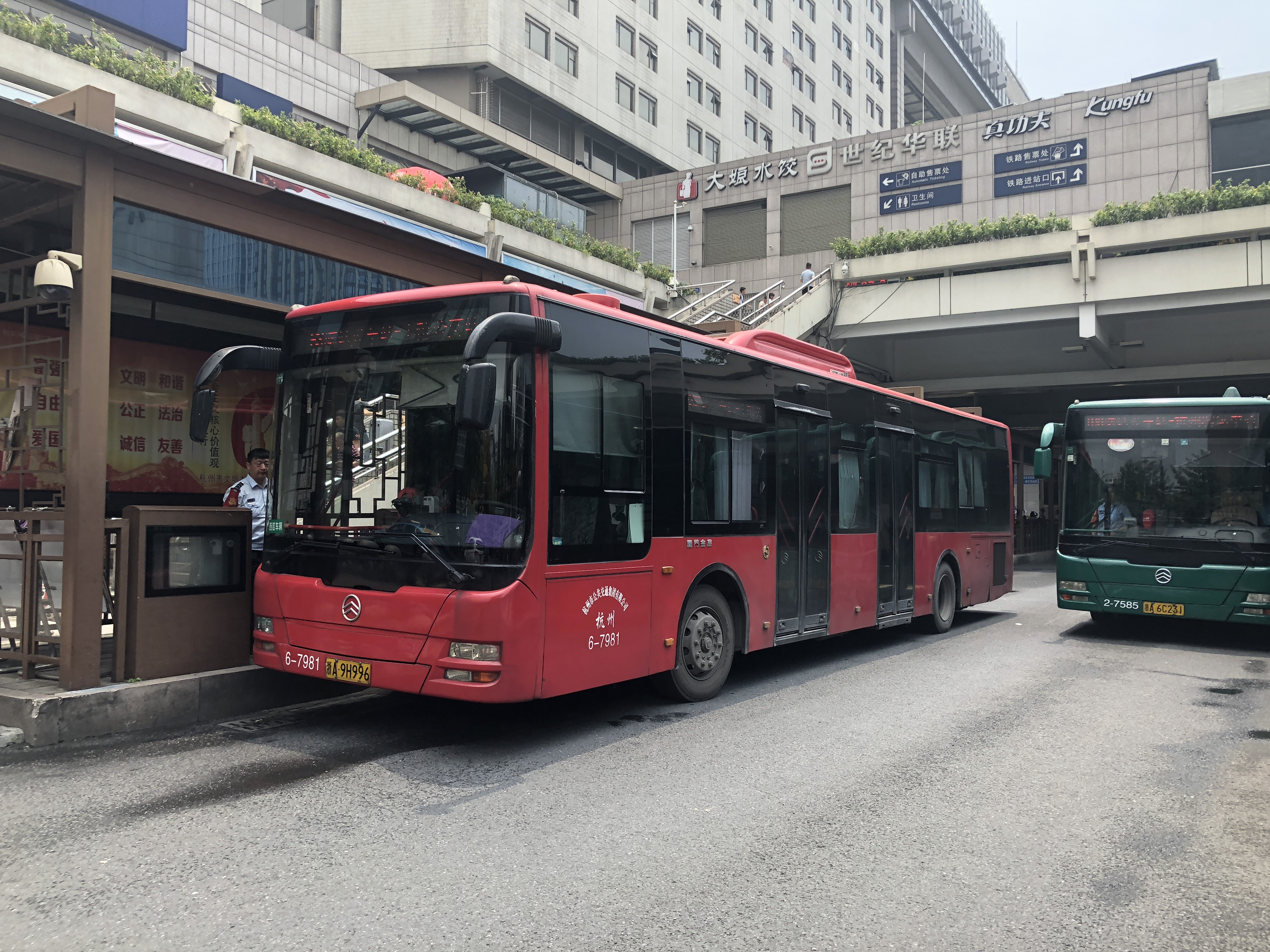 中文（中国大陆）: XML6125JHEV18C